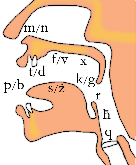 articulation des consonnes dans la langue maltaise